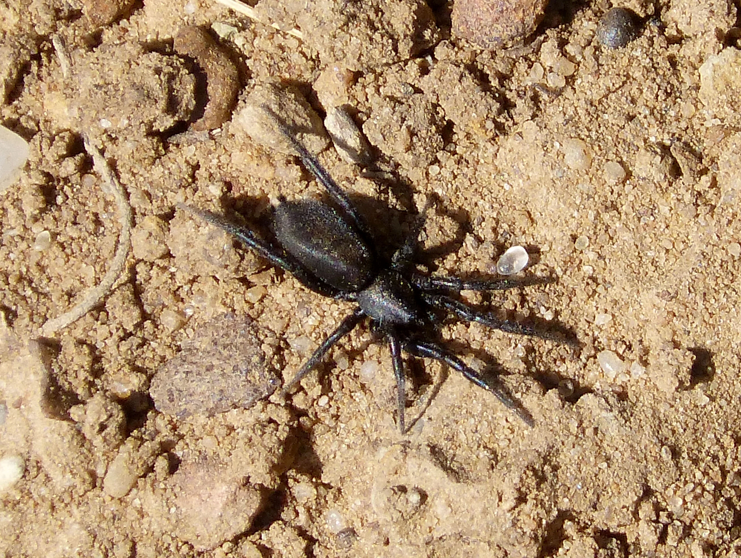 Alcornocales N.P. Andalucia Spain